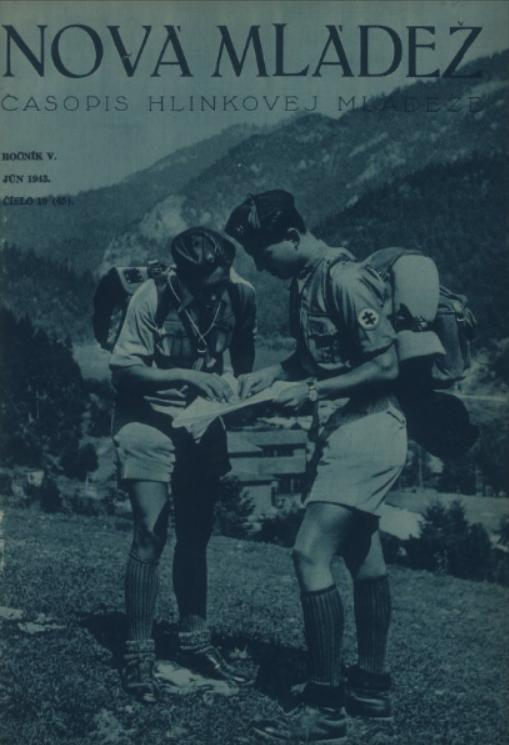 Titulný list časopisu Nová mládež.